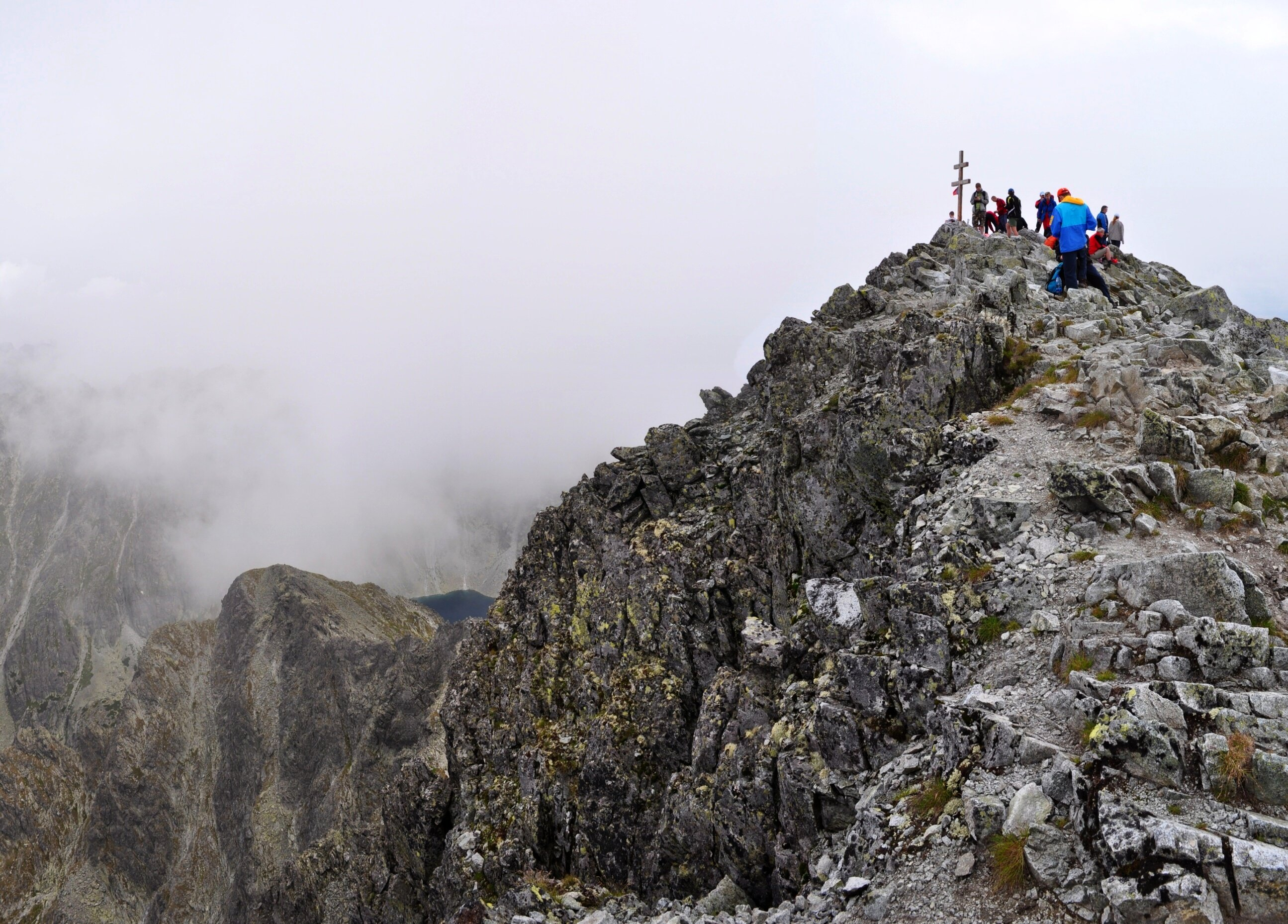 Vrchol Kriváňa v pozadí Nižné Terianske pleso